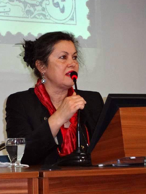 Rukiye Eser Öztaşçı Gültekin Fotoğrafları